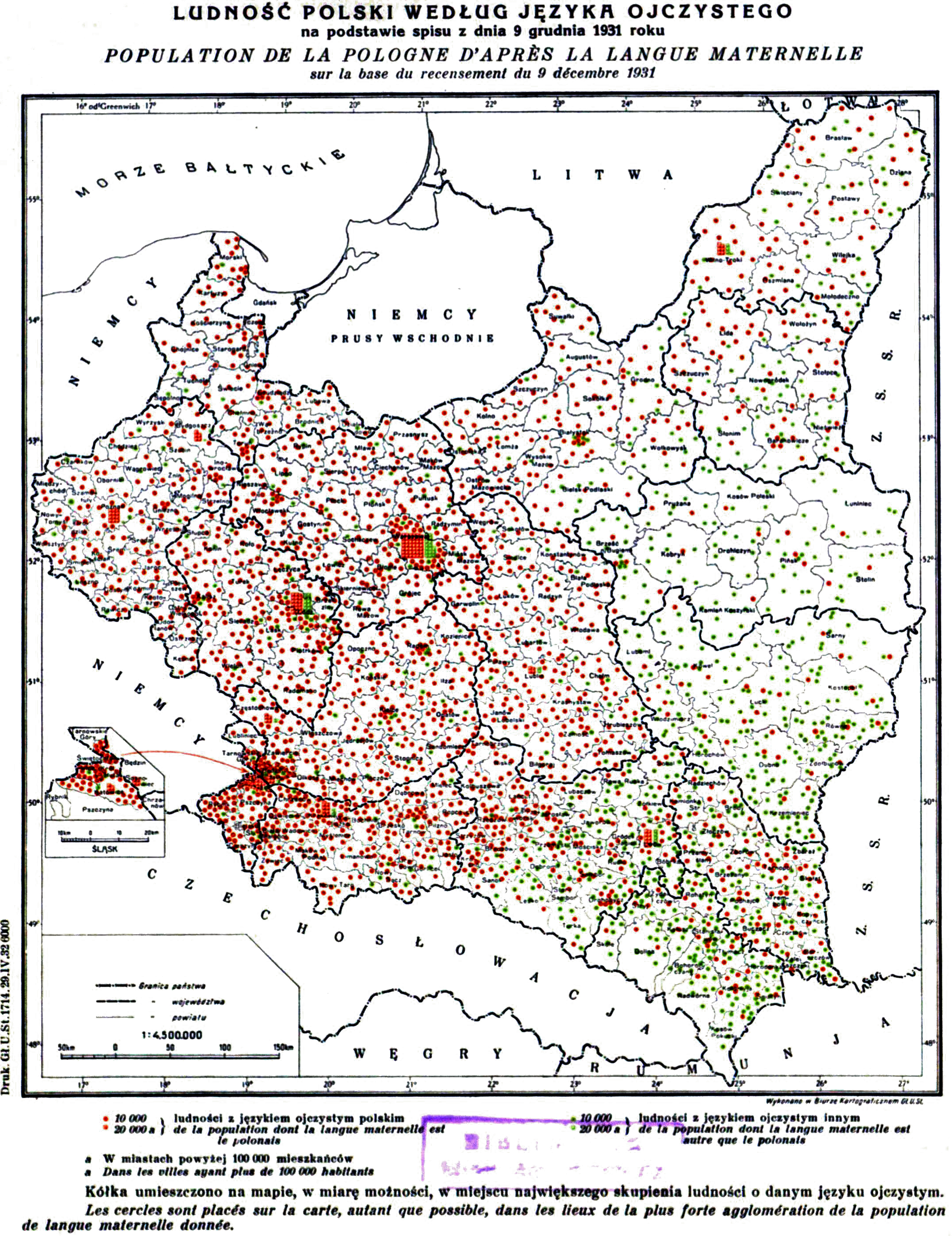 Ludność Polski wg języka ojczystego według spisu powszechnego z 9 grudnia 1931